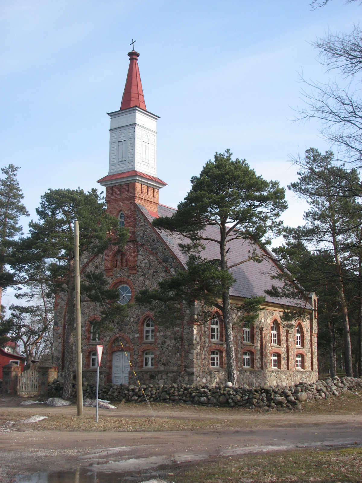 Häädemeeste St. Michaels Church, Häädemeeste, Estonia. Year 2008